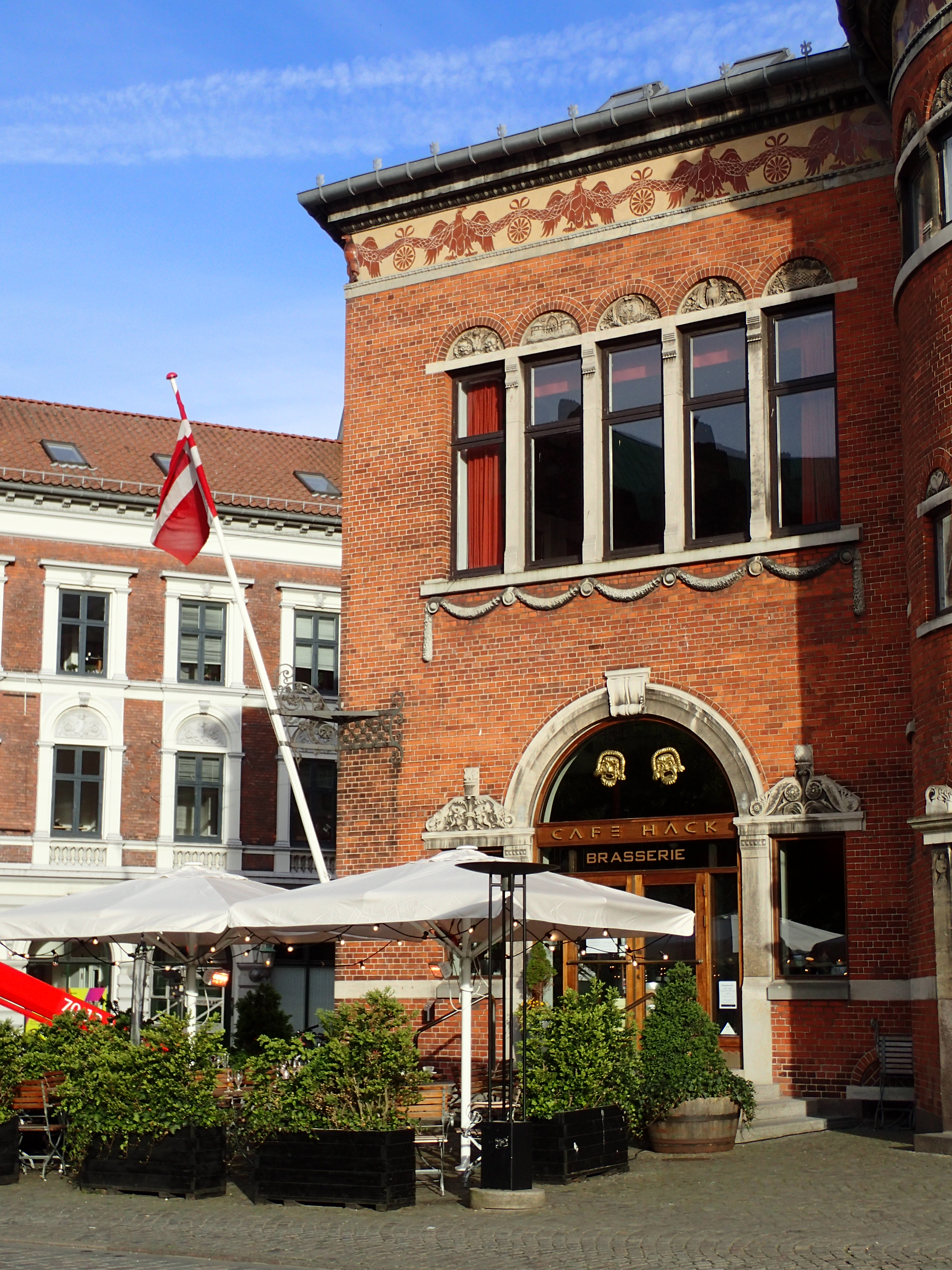 Café Hack, Aarhus Teater.